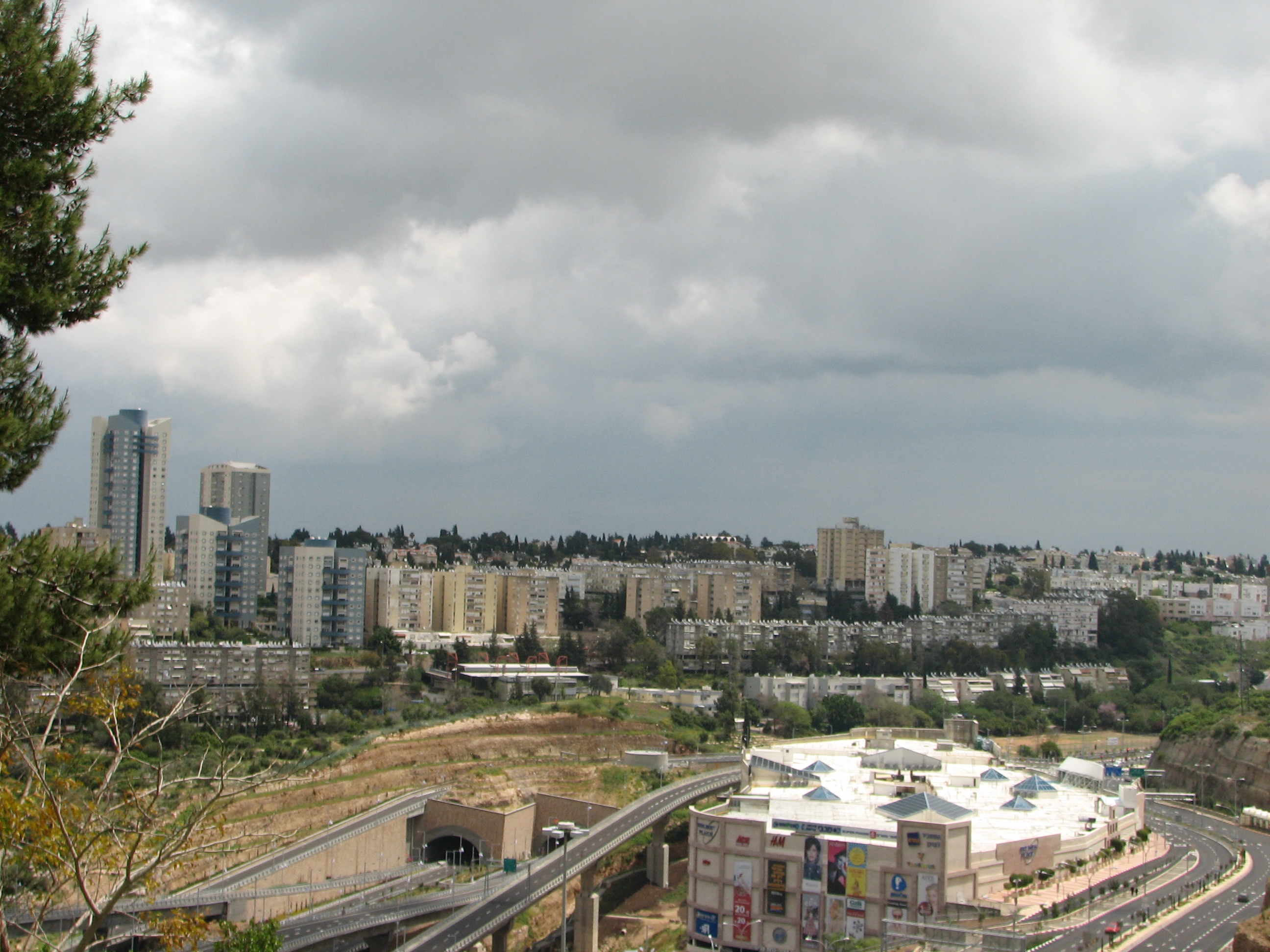 Izraeliya, Neve Shaanan , Haifa Israel משמאל שכונת יזרעאליה ליד נוה שאנן, מימין מרכז הקניות הגרנד קניון